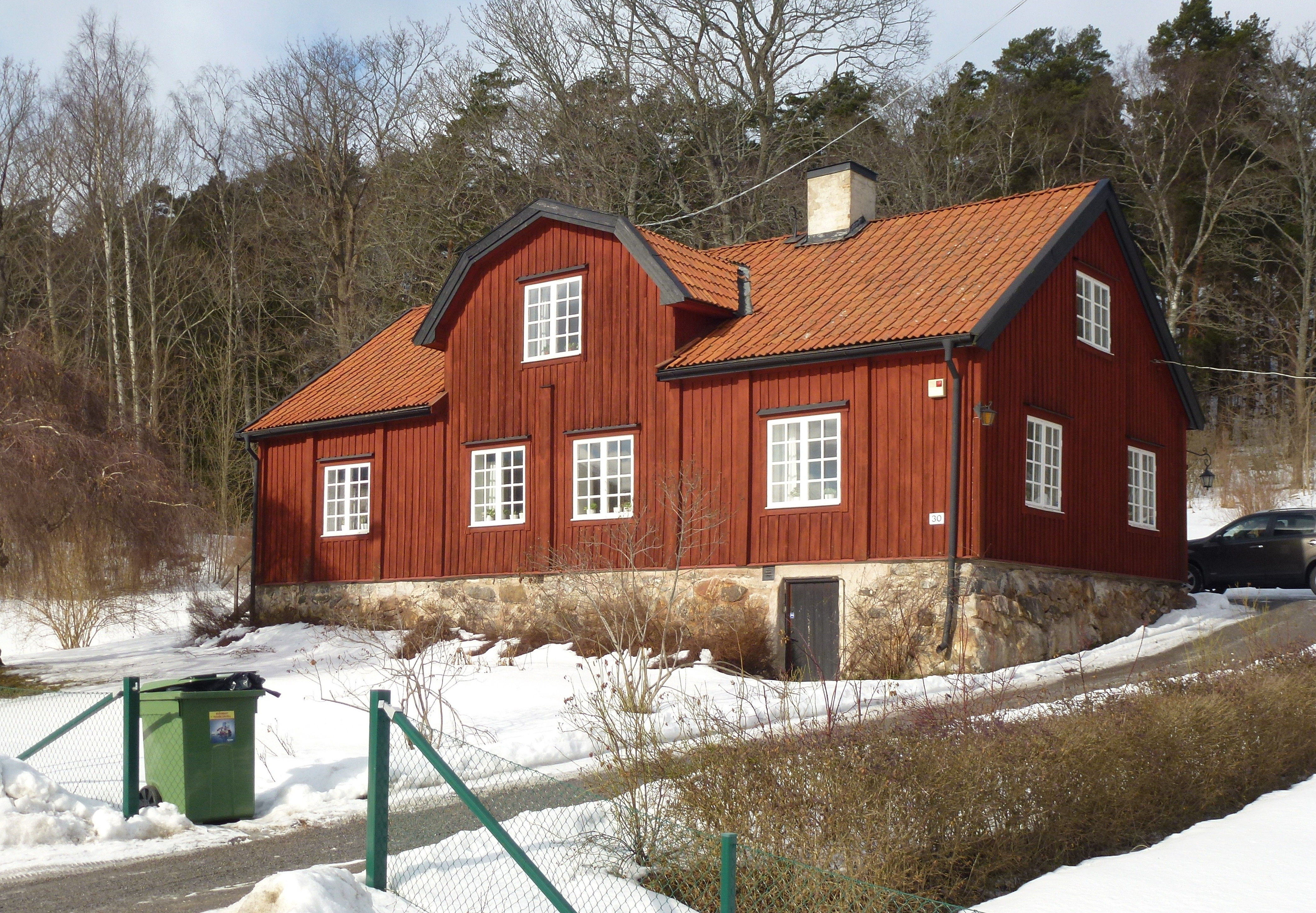 Klockargården Botkyrka kyrka